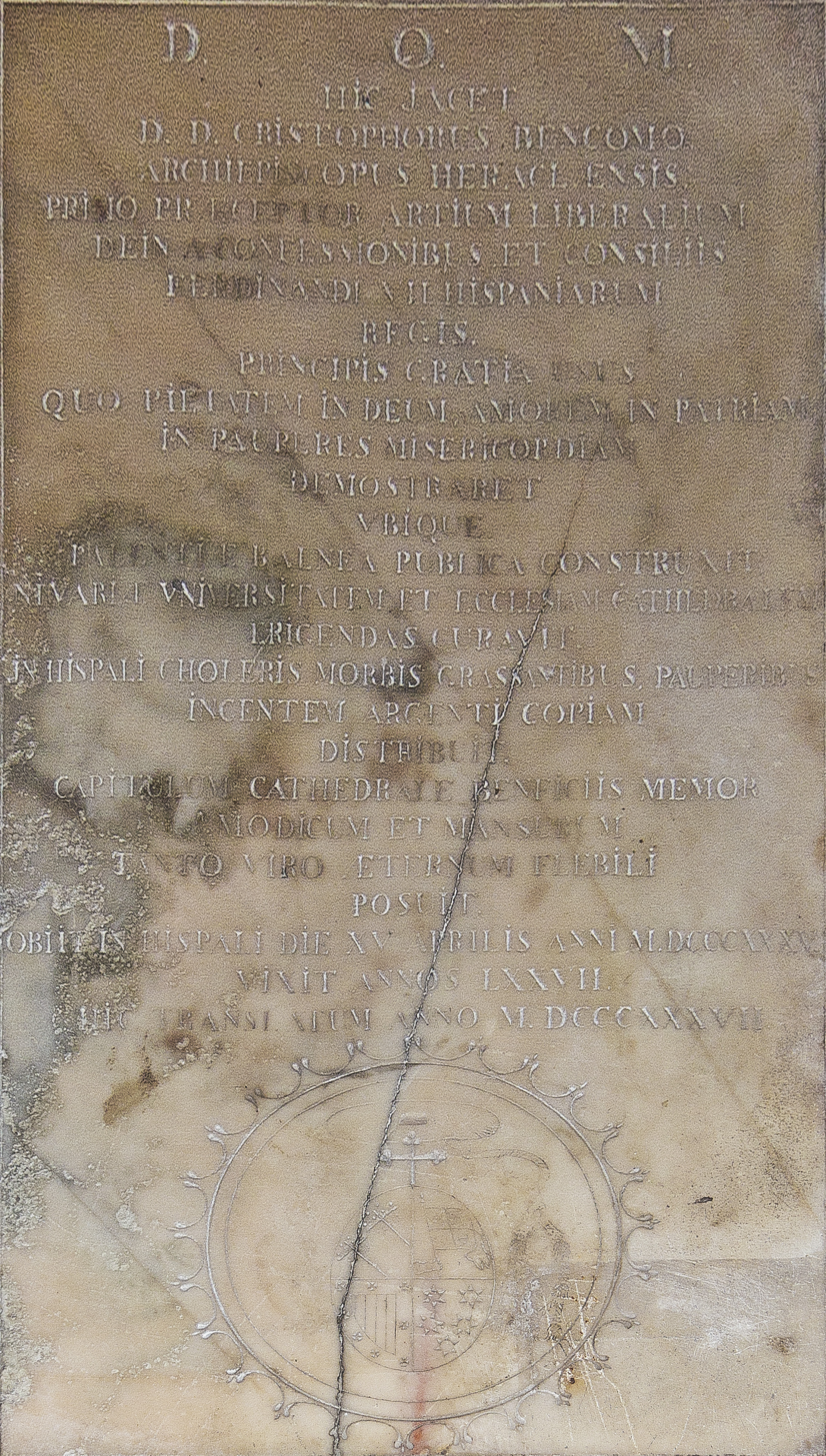 Grabplatte Cristóbal Bencomos auf der rechten Seite des Altarraums der Kathedrale von La Laguna